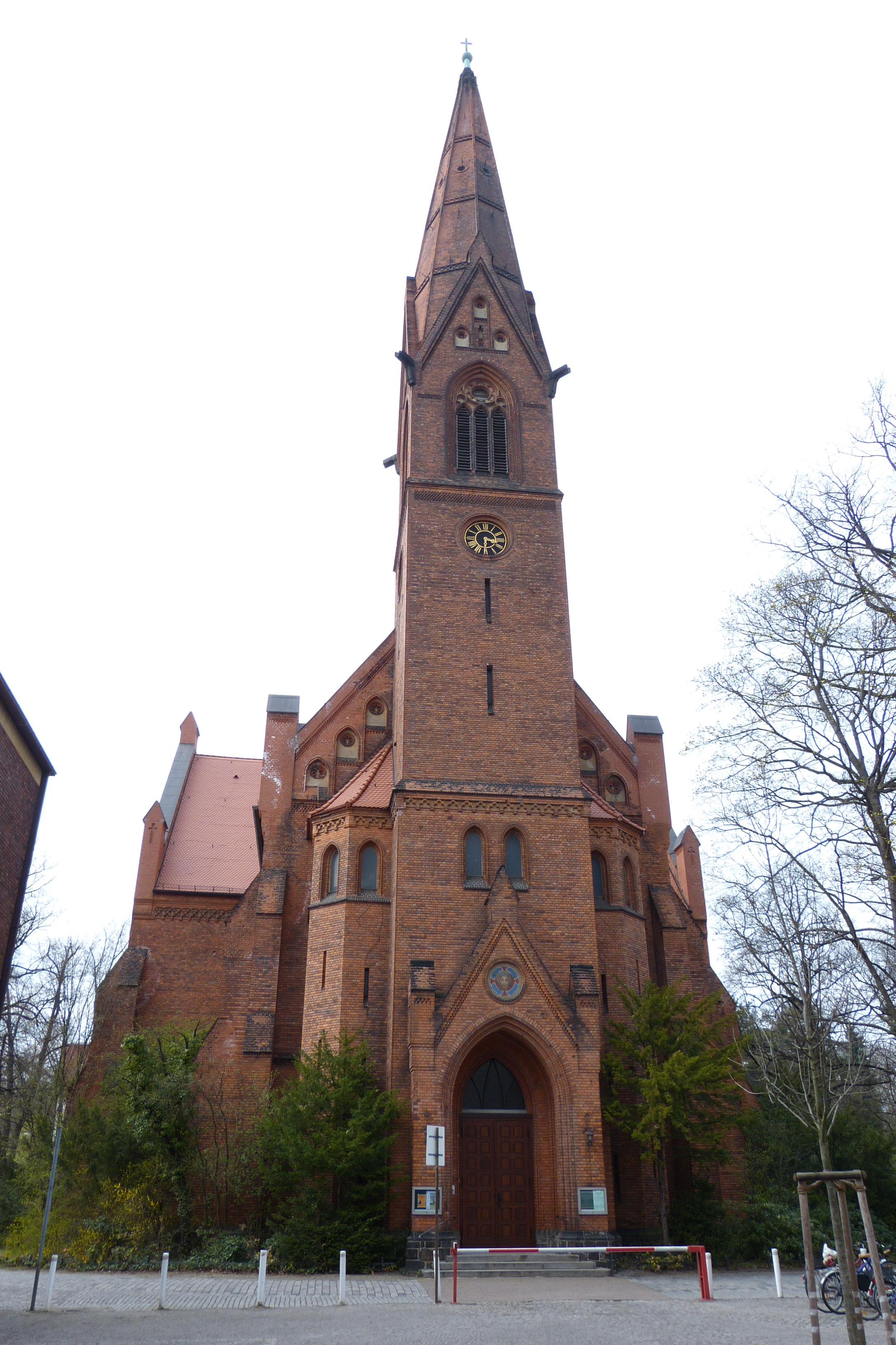 Berlin-Steglitz, Ev. Matthäuskirche, Schloßstr. 44/ Rothenburgstr. 31A